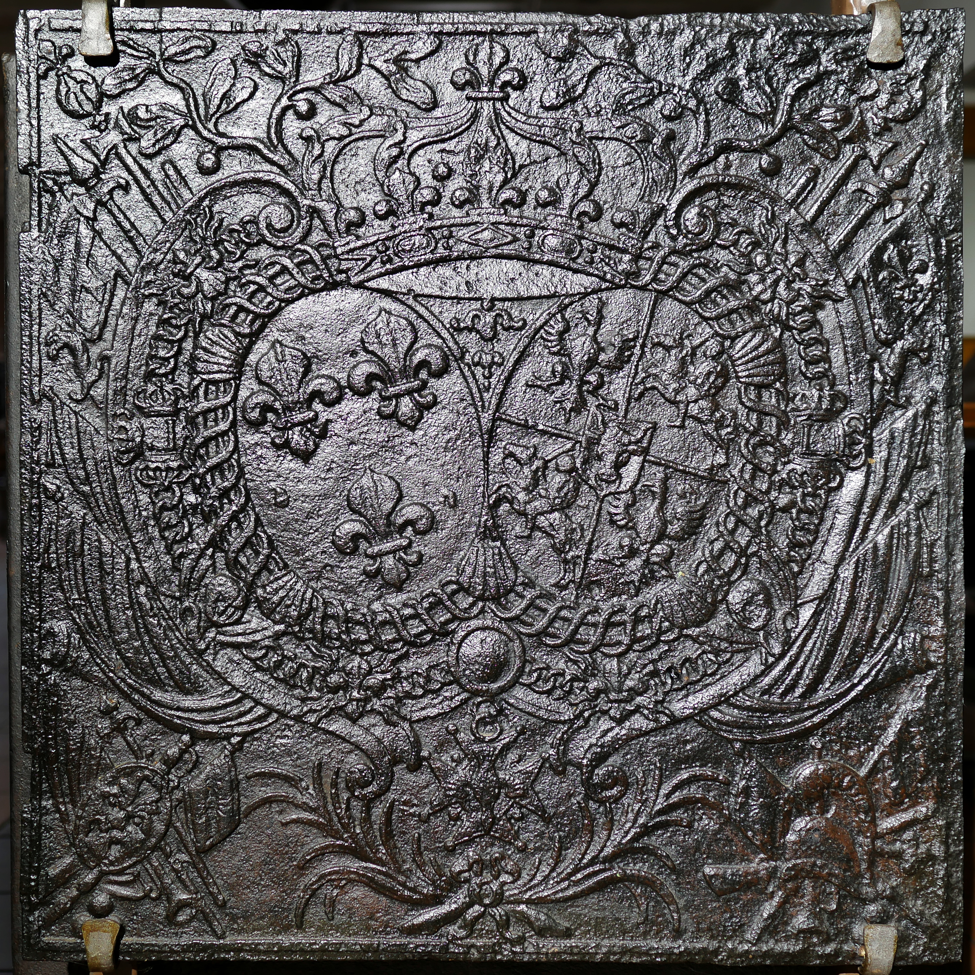 Hochzeitswappen Ludwig XV. - Maria Leszczyński Ofenplatte, Zinsweiler, 1. H. 18. Jh. Die Ofenplatte symbolisiert die Eheschließung zwischen dem französischen König Ludwig XV. (geb. 1710, gest. 1774) mit Maria Leszczyński (geb. 1703, gest. 1768). Im linken Wapenschild finden sich drei Bourbonenlilien für das Französische Königshaus. Das rechte Wappenschild zeigt das Wappen der Leszczyńskis, eigentlich ihres Vaters als lebenslanger König von Polen, Herzog von Lothringen und Barrois: geviert, auf Herzschild Büffelkopf (Leszczyński), Feld 1 und 4 bekrönter Adler (Polen) und Feld 2 und 3 Reiter in Rüstung (Litauen). Die vereinigten Schilde werden umgeben von den Ketten vom Orden des Heiligen Geistes (Muschelkette) und des heiligen Ludwig (außen). Oben finden sich sich Lorbeerzweige, rechts und links Waffen und Trophäen, Standarte mit Bourbonenlilie. Unten links und rechts erkennt man zwei Standarten mit Sonne, links das Schild der Kriegsgöttin Athene mit dem Anlitz der Medusa, die mit ihrer Hilfe von Perseus enthaupet wurde. Maria Karolina Zofia Felicja Leszczyńska aus dem polnischen Adelsgeschlecht der Leszczyńskis heiratete 1725 den König von Frankreich Ludwig XV. Die politisch eingefädelte Eheschließung war besonders für ihren Vater nützlich, denn nach dem Polnischen Erbfolgekrieg bringt der Frieden von Wien eine Einigung: der Kandidat der französischen Partei, Stanislaus Leszczyńskis verzichtet auf die polnische Krone und erhält (als Schwiegervater Ludwig XV.) dafür Lothringen. Ferner wird vereinbart, dass das Land nach dem Tod Leszczyńskis an Frankreich fällt, dies tritt 1766 ein. Freilichtrmuseum Roscheider Hof